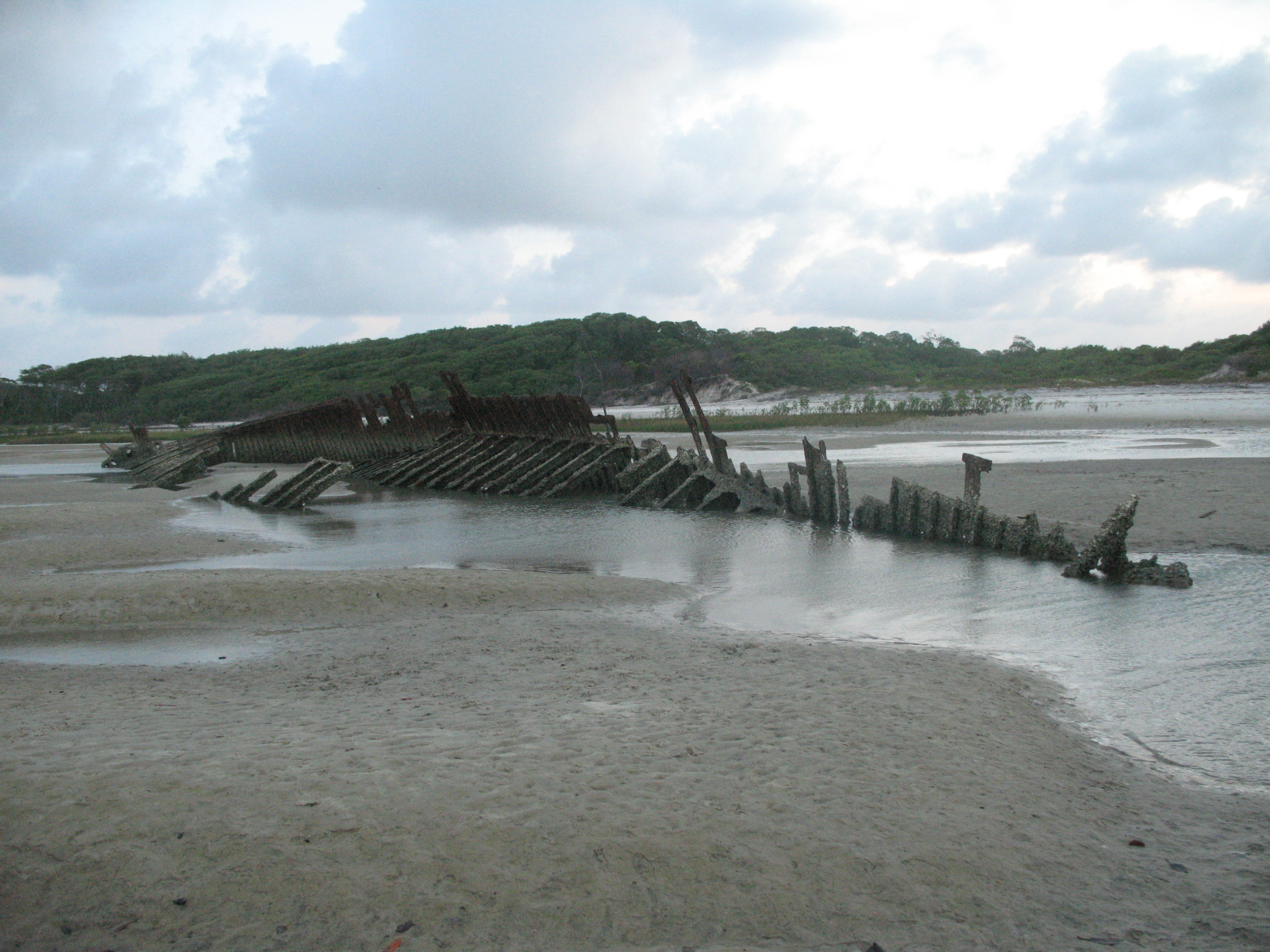 Navio Naufragado na praia de Ajuruteua - Pará - Brasil.